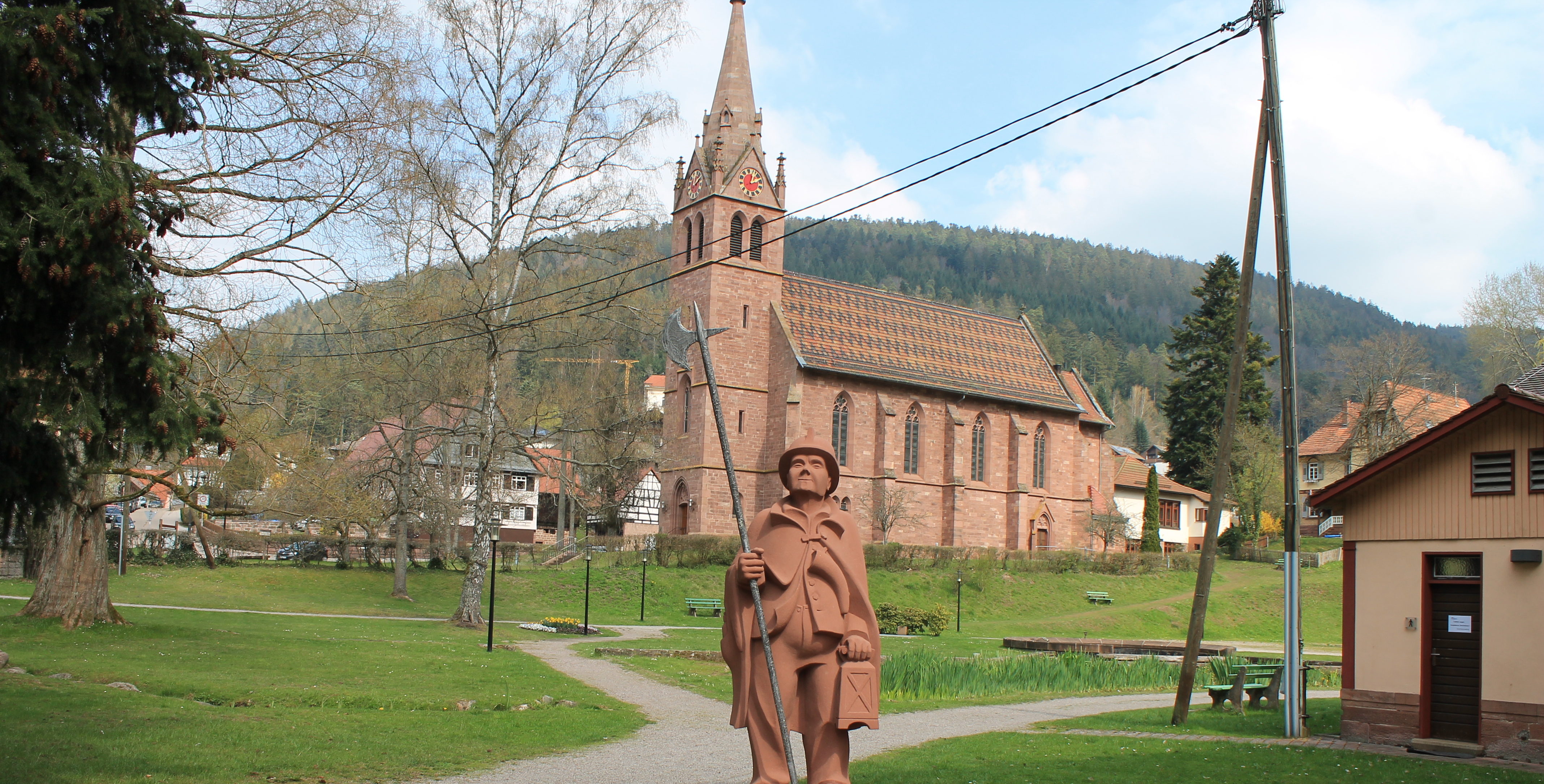 Höfen an der Enz mit Kirche und Nachtwächter Führung mit dem Kreisgeschichtsverein Calw e.V. am 07.04.2019